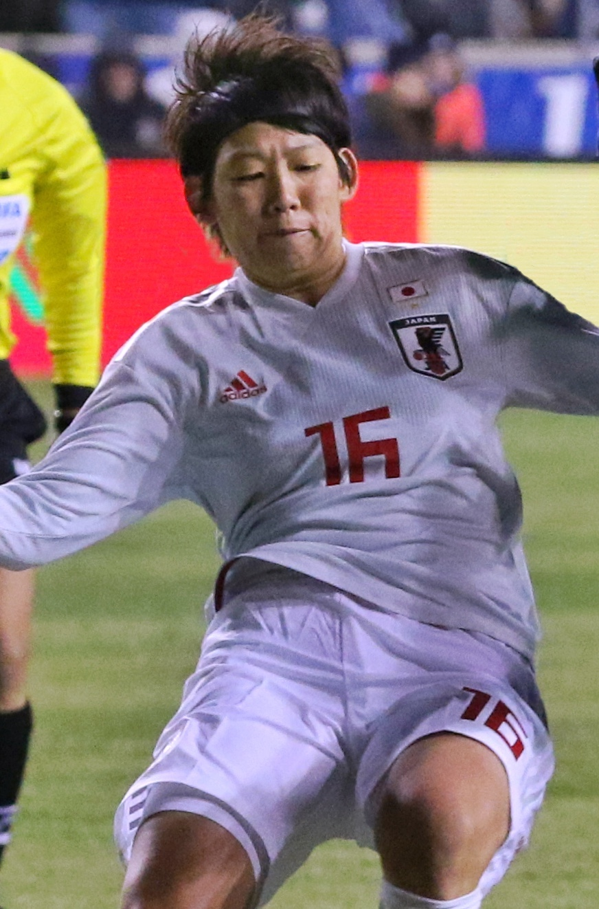 Arisa Matsubara & Alex Morgan